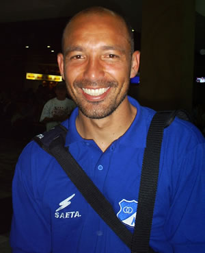 Ricardo Ciciliano. Jugador de Millonarios